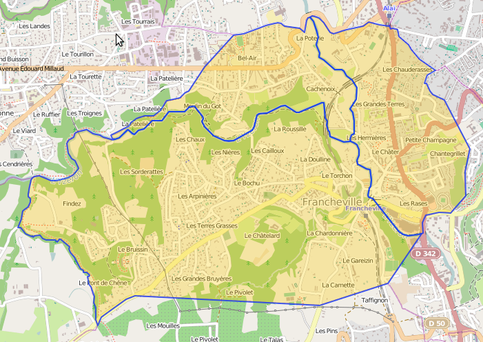 Quartiers de Francheville This map may be incomplete, and may contain errors. Don't rely solely on it for navigation.